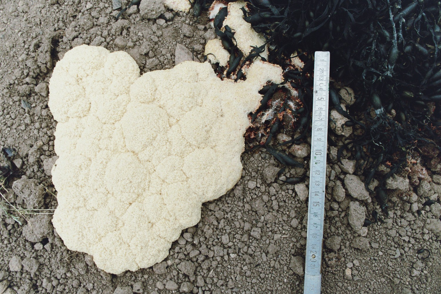 Fuligo septica, forme blanche ("vomi de chien"), s'étalant sur une terre de jardin fraîchement travaillée,à partir d'un tas de fumier de goémon .